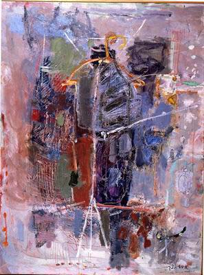 Painting